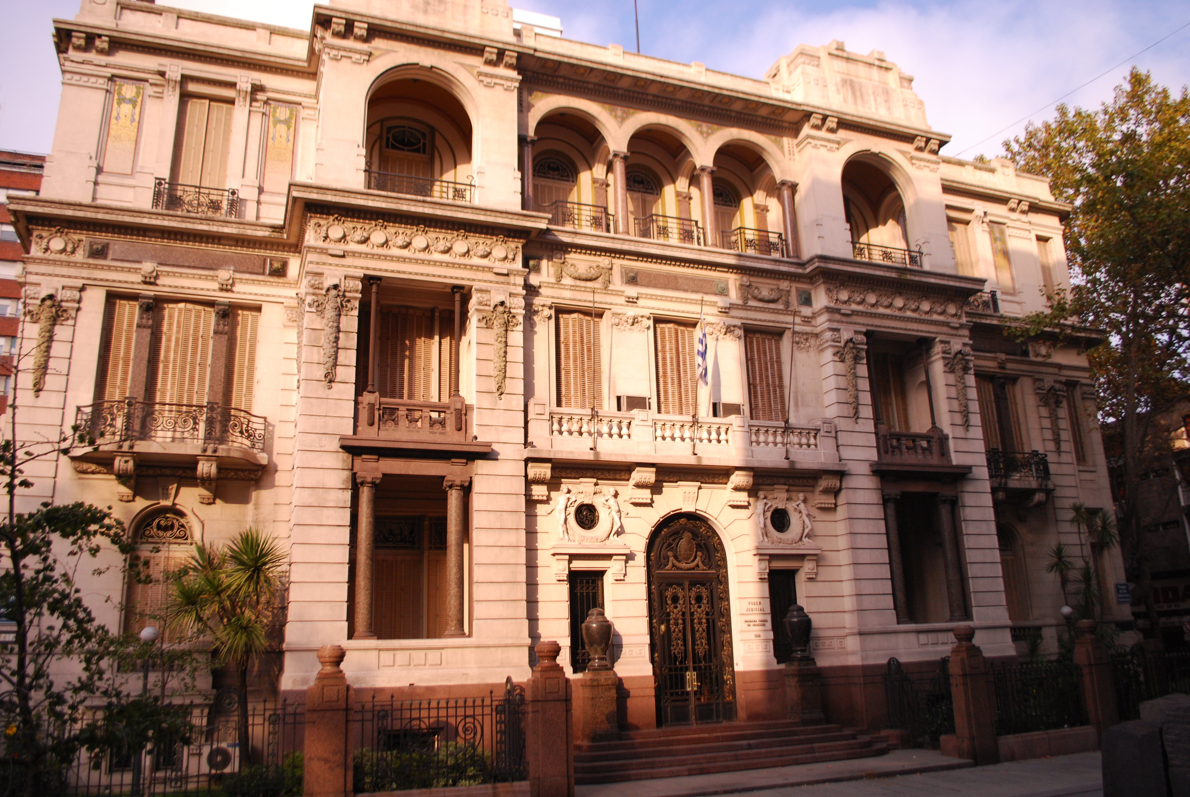 Palacio Piria, Sede de la Suprema Corte de Justicia de Uruguay.